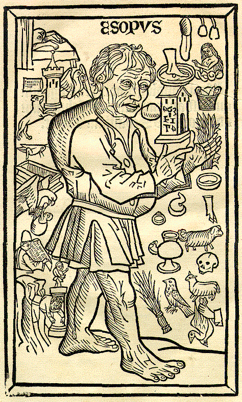 Frontispiz — Aesopus; Steinhöwel, Heinrich; Brant, Sebastian: Esopi appologi sive mythologi: cum quibusdam carminum et fabularum additionibus Sebastiani Brant: Äsop umgeben von Bildzeichen, die Geschichten aus seiner Vita repräsentieren